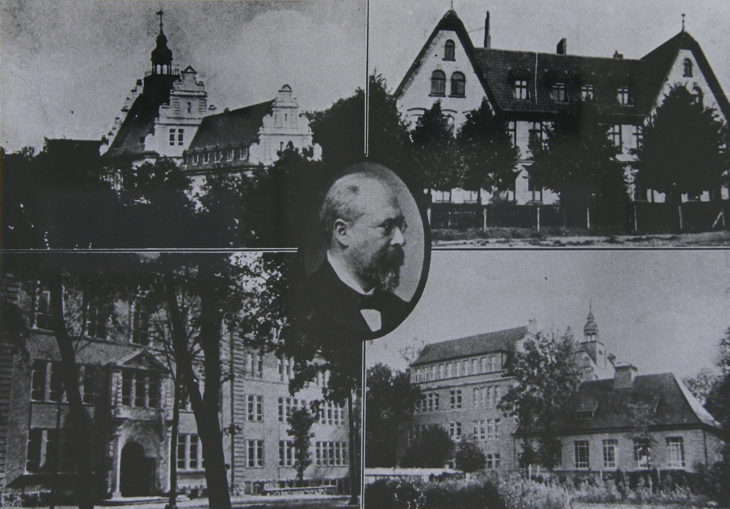 Königliches Hufen Gymnasium, Königsberg (Ostpreußen)